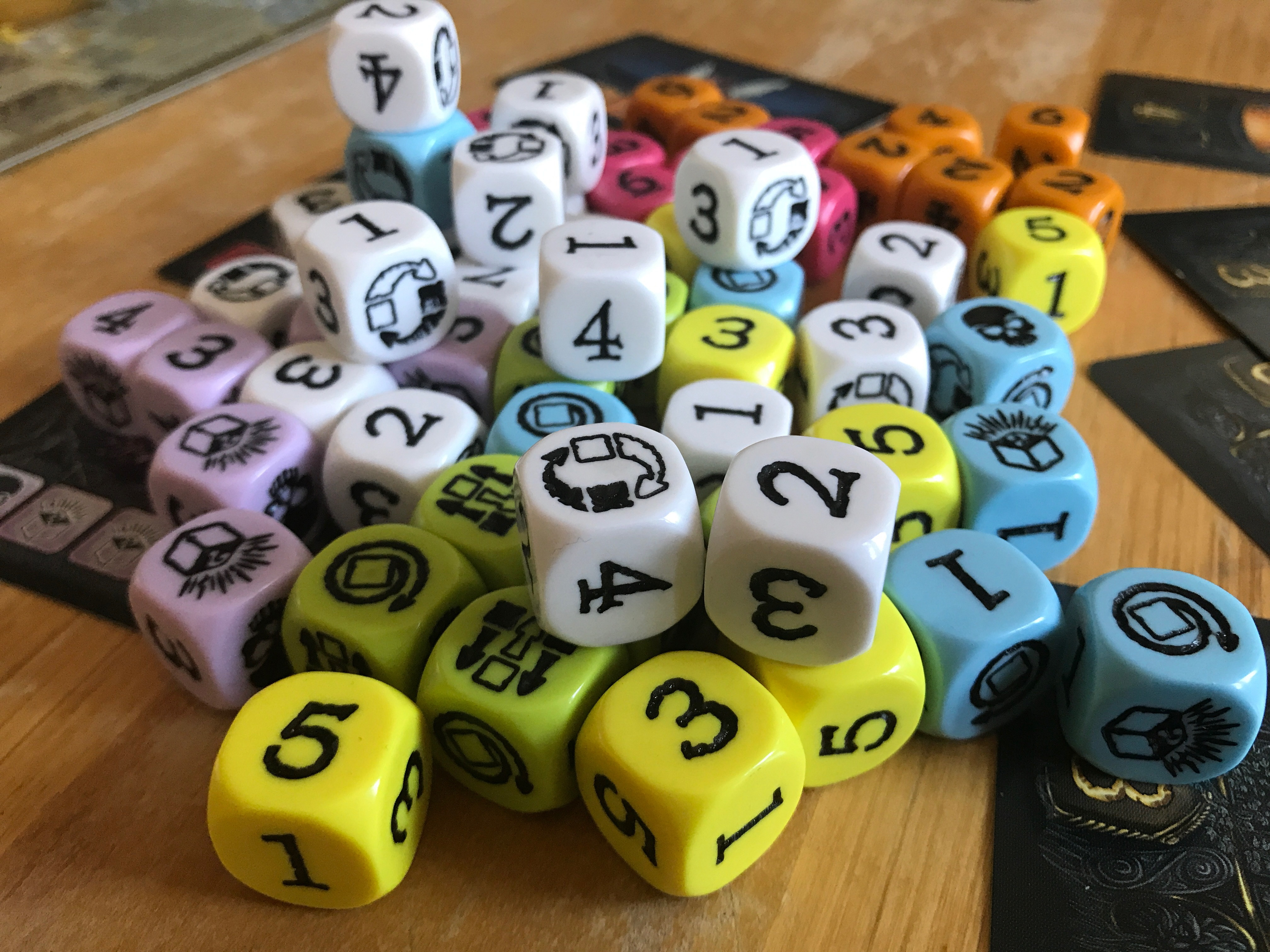 ciúb, Spielmaterial